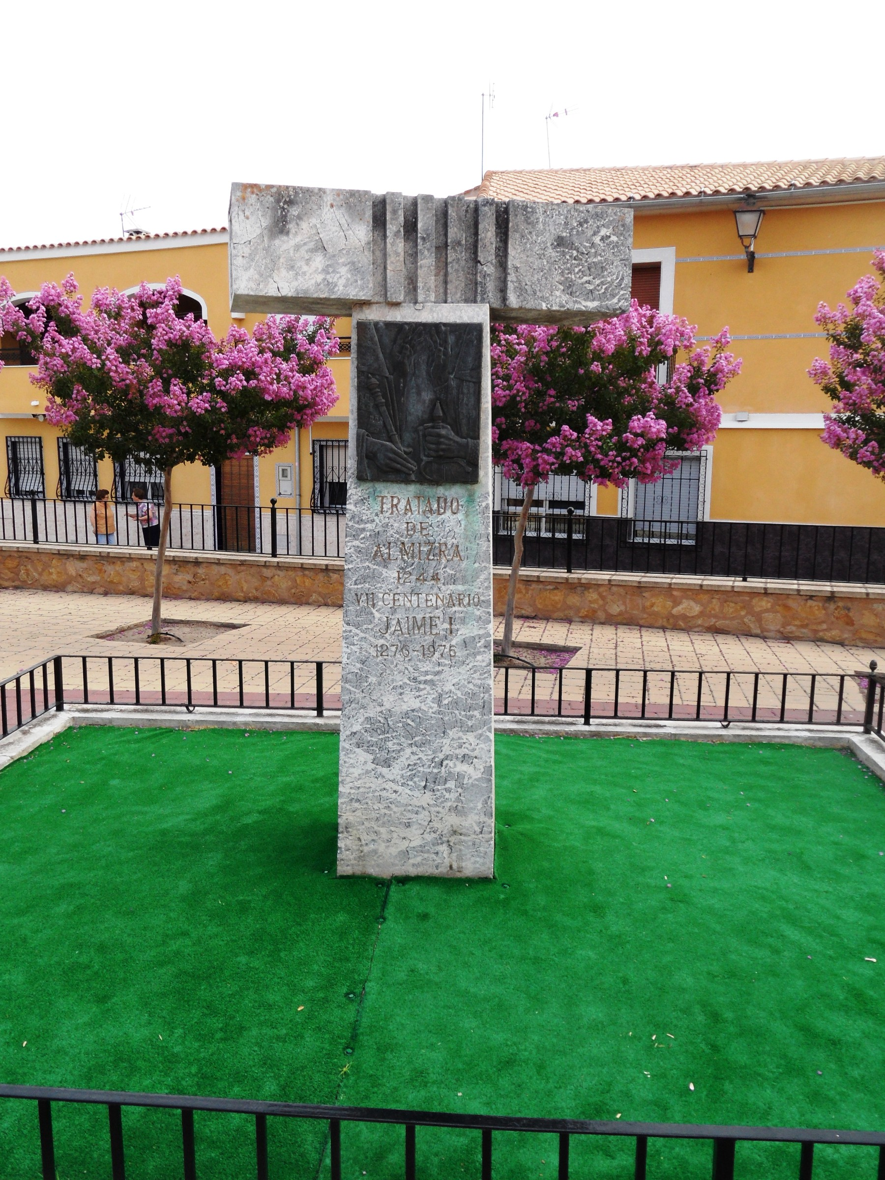 Monument al Tractat d'Almiçrà.